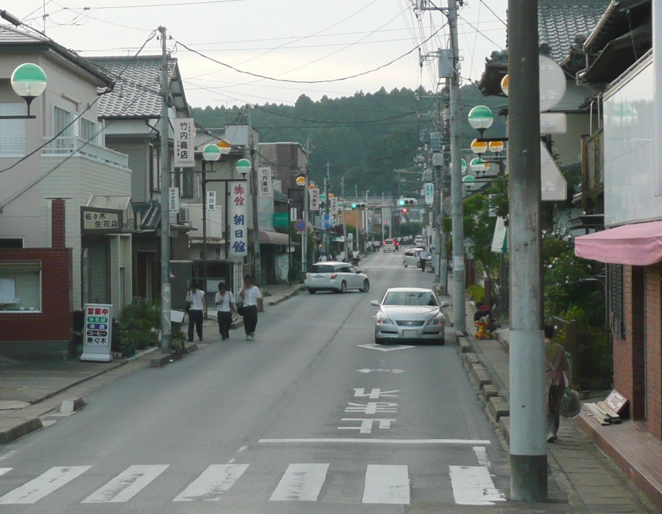 千葉県道111号松尾停車場線